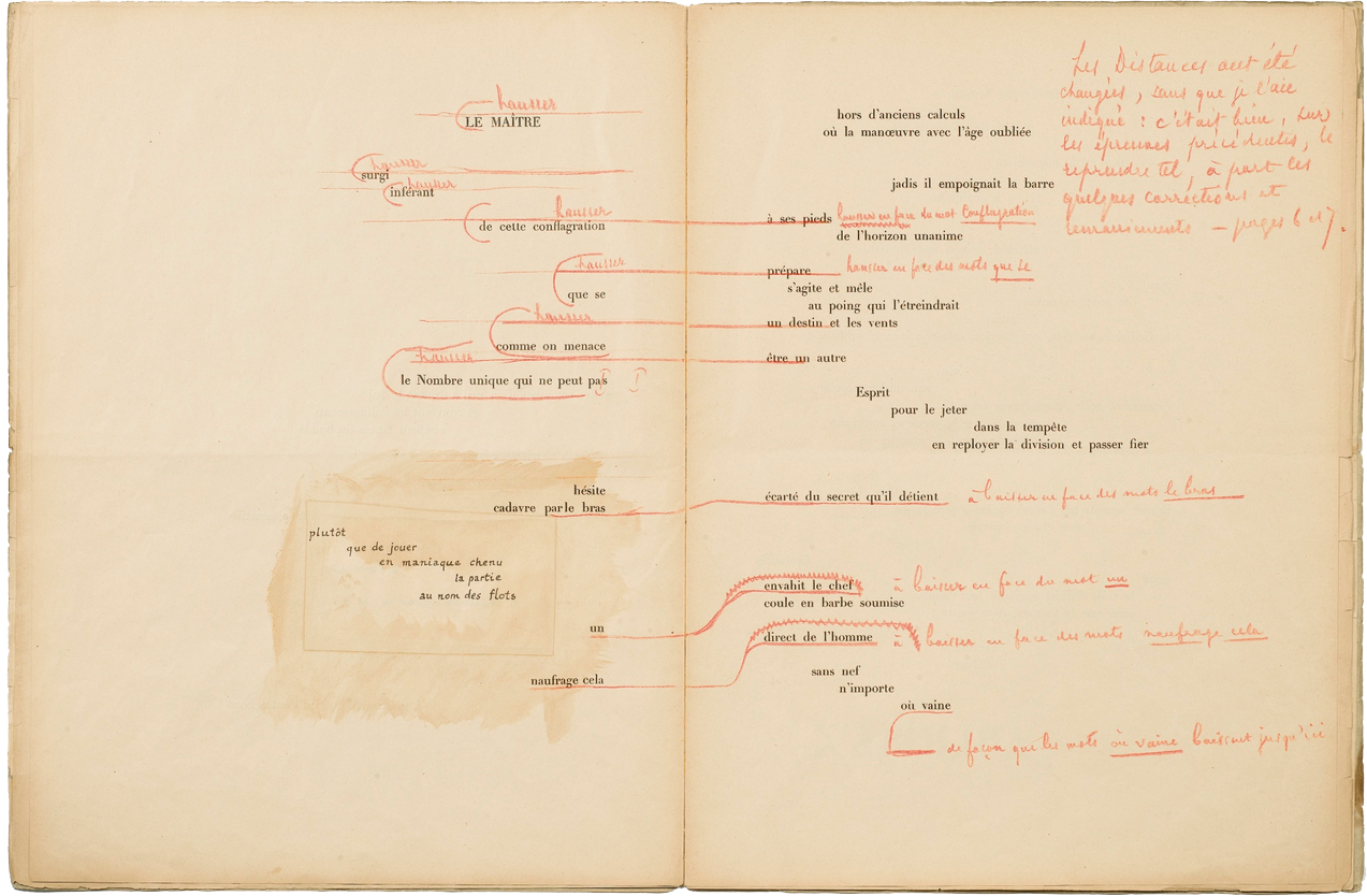 Epreuve du Coup de dé pour l'édition d'Ambroise Vollard.